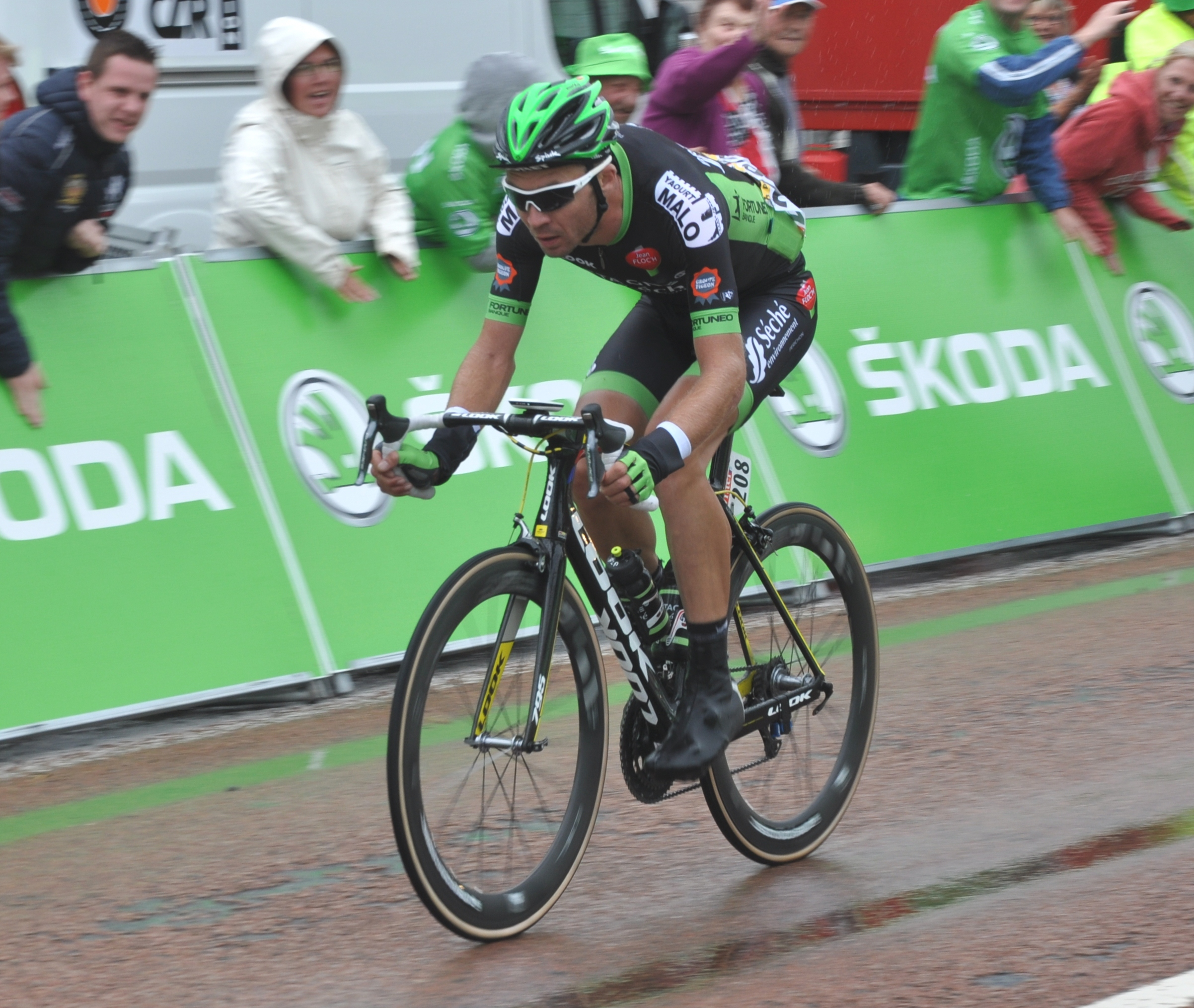 Tour de France 2015, étape 5, Pierre-Luc Périchon échappé passe en tête le sprint de Rancourt